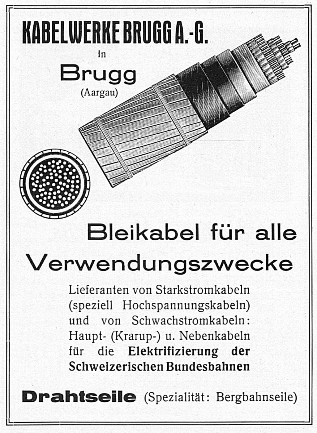 Insterat der Kabelwerke Brugg mit Bleikabel